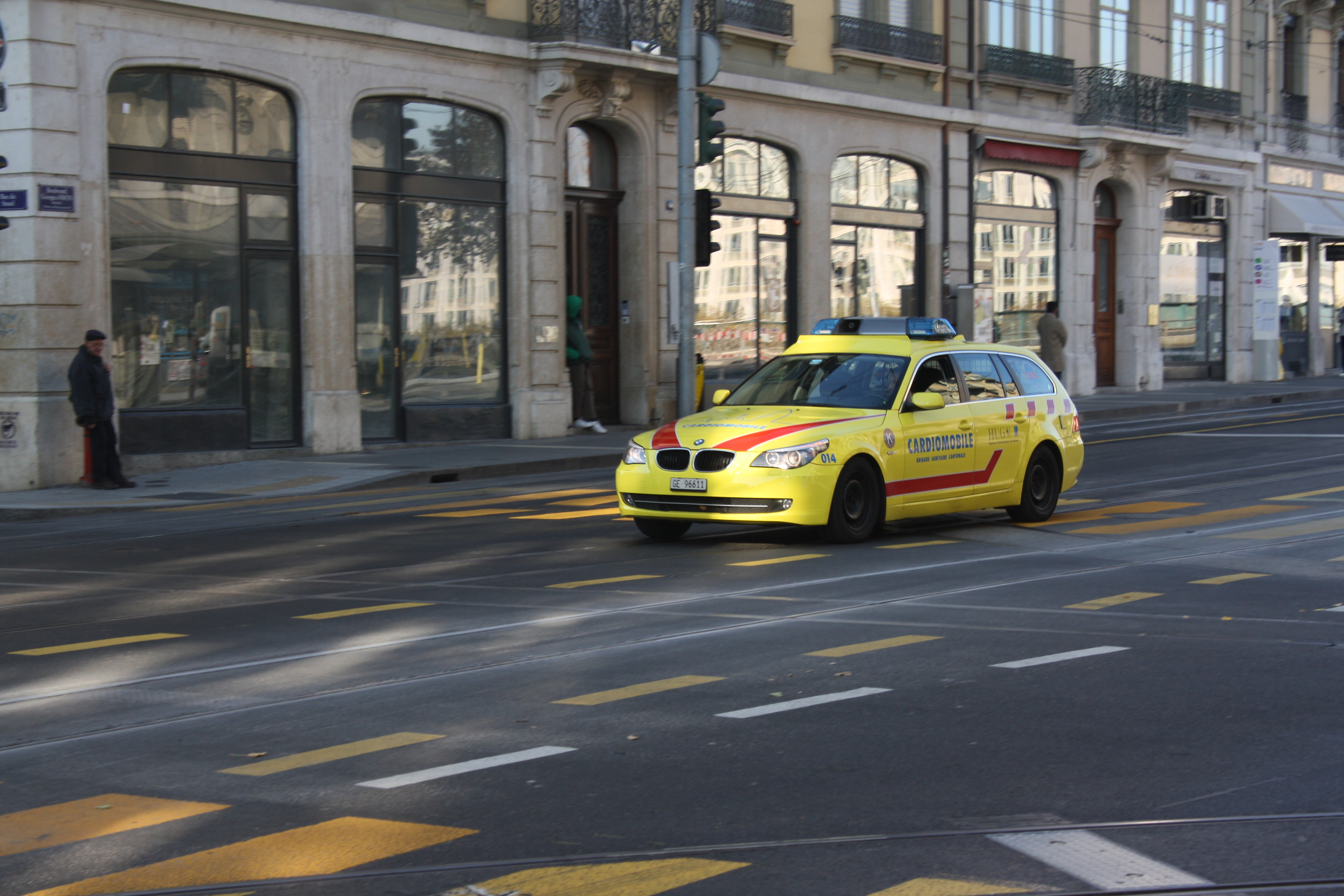 Un véhicule d'urgence Cardiomobile circulant à Genève.